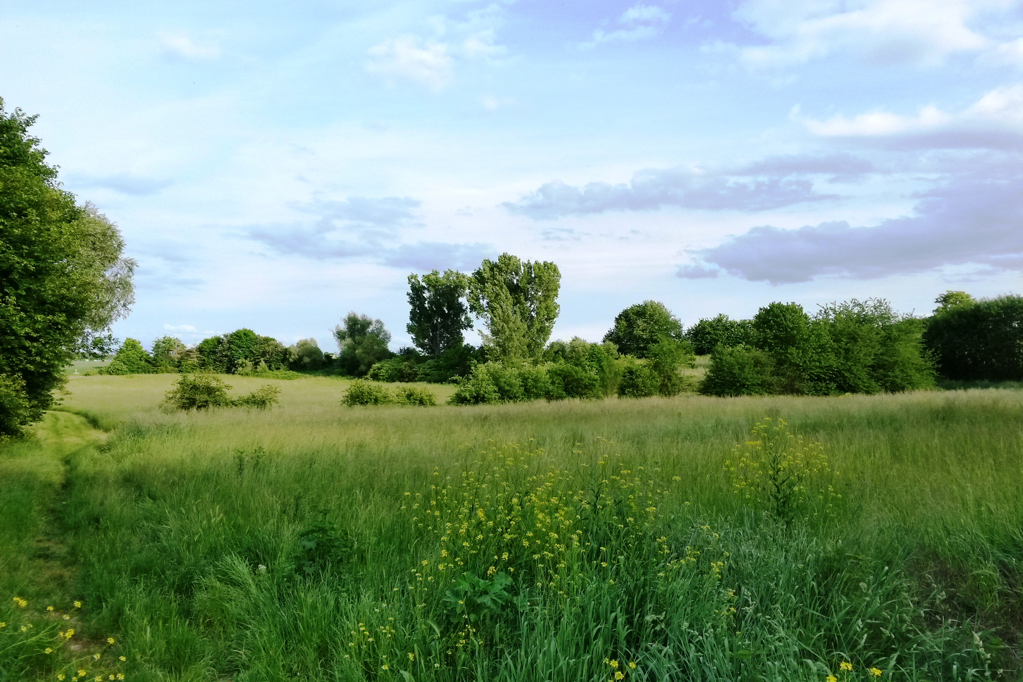 Naturschutzgebiet Im Flößrich/Gänsklauer im Landkreis Mainz-Bingen (Bubenheim, Schwabenheim): Gehölze und Grünland südlich der K16.